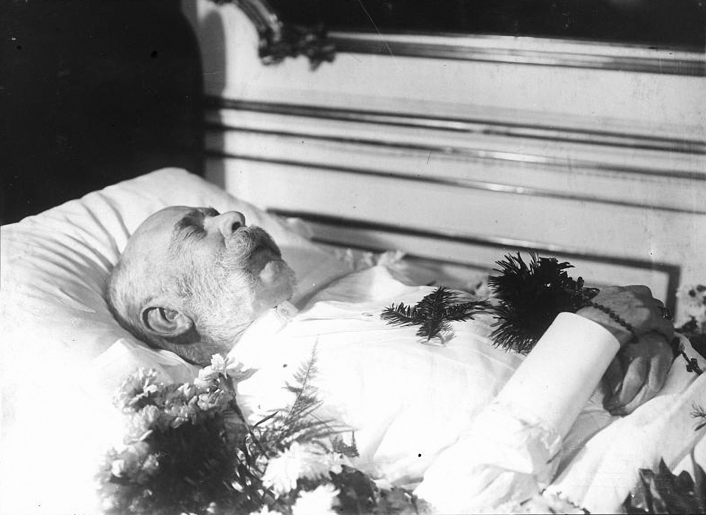 Bild des Leichnahms von Kaiser Franz Joseph I